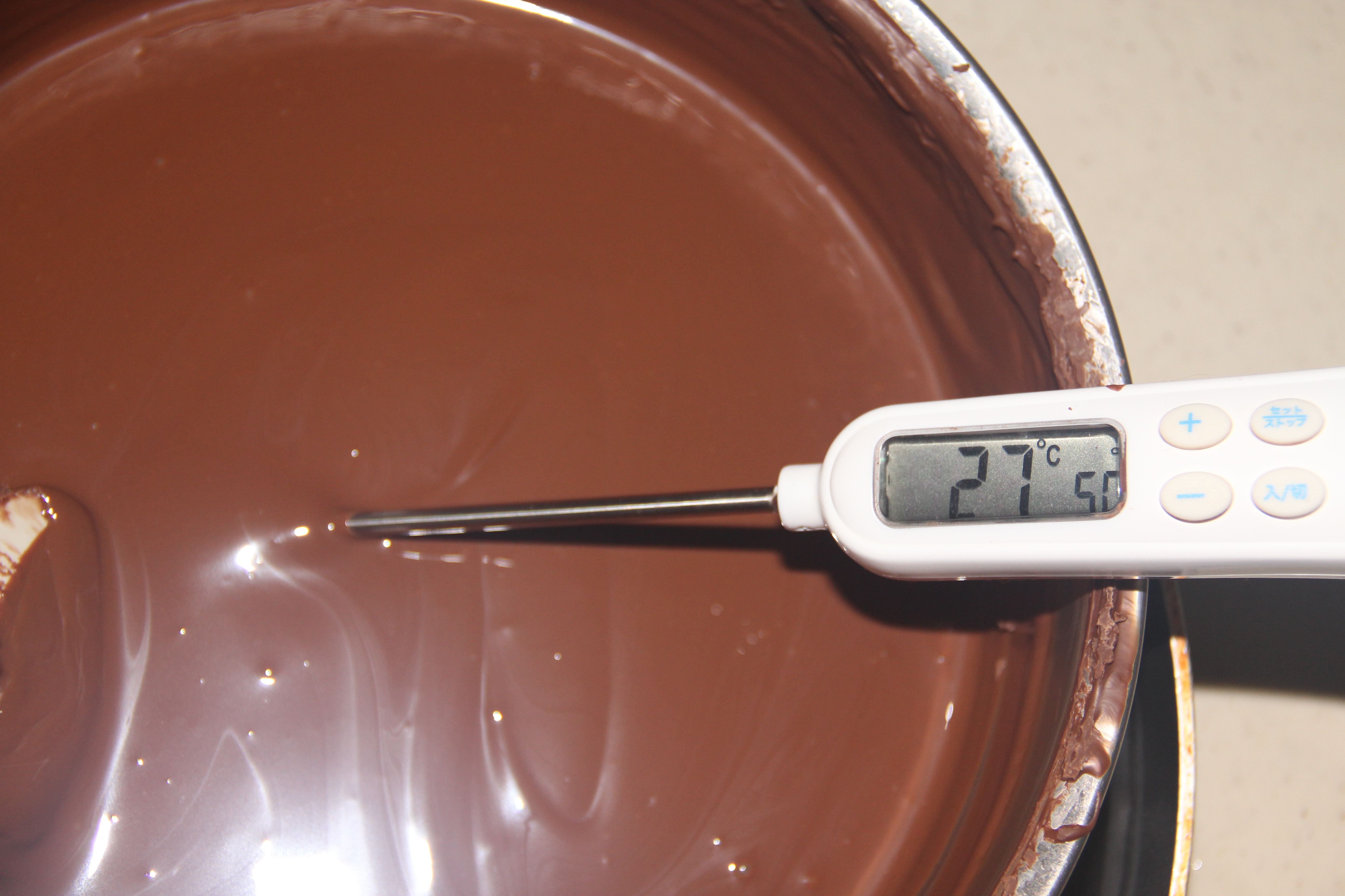 Chocolate tempering